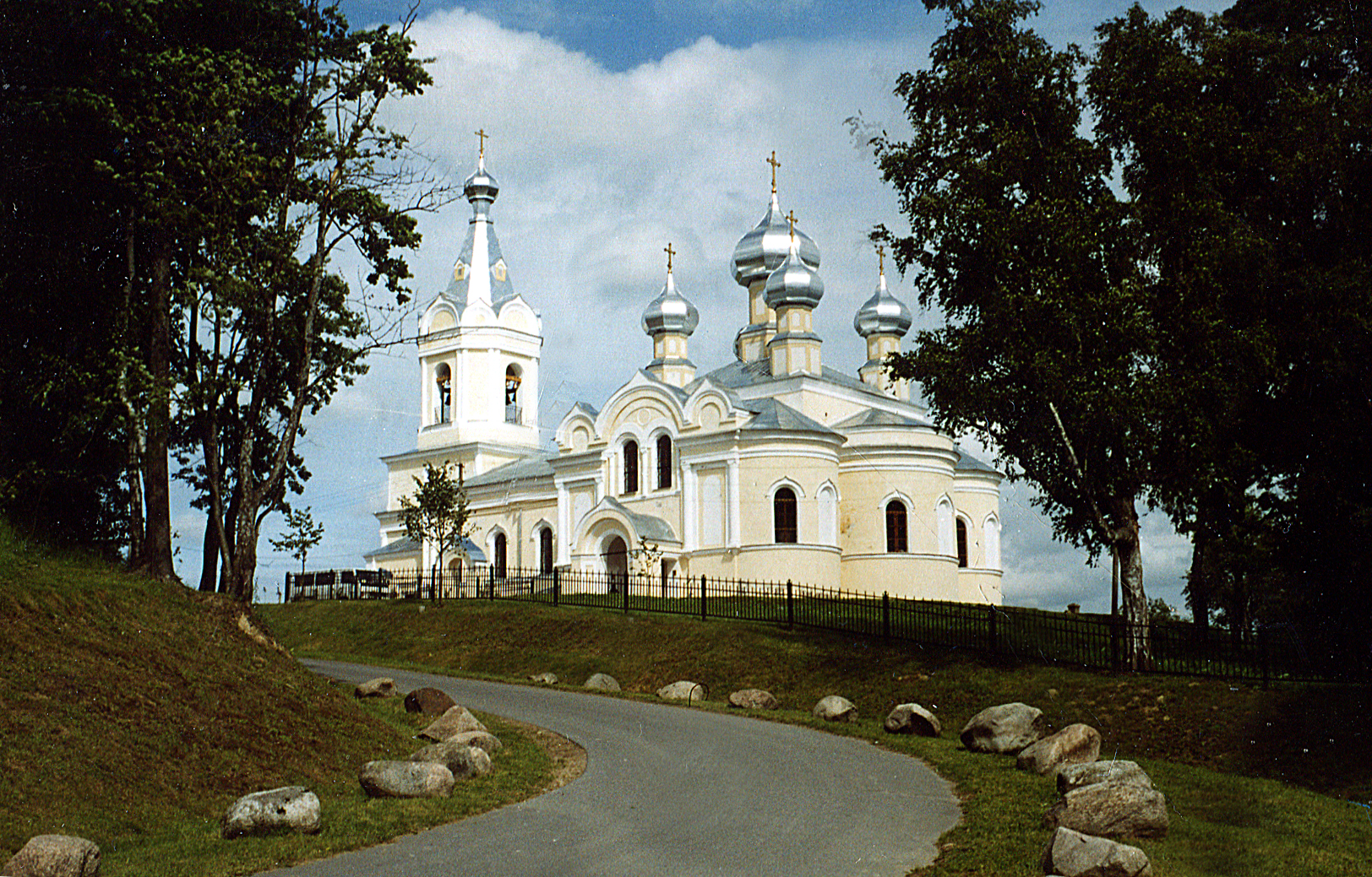 Церковь Успения Пресвятой Богородицы в Сологубовке-Лезье.